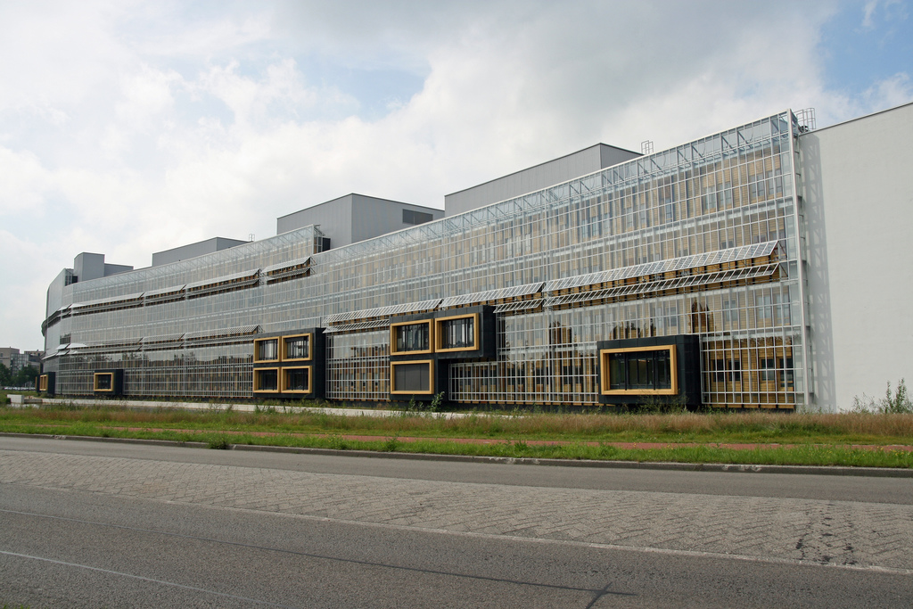 Martiniziekenhuis, Groningen, oostgevel aan Paterswoldseweg